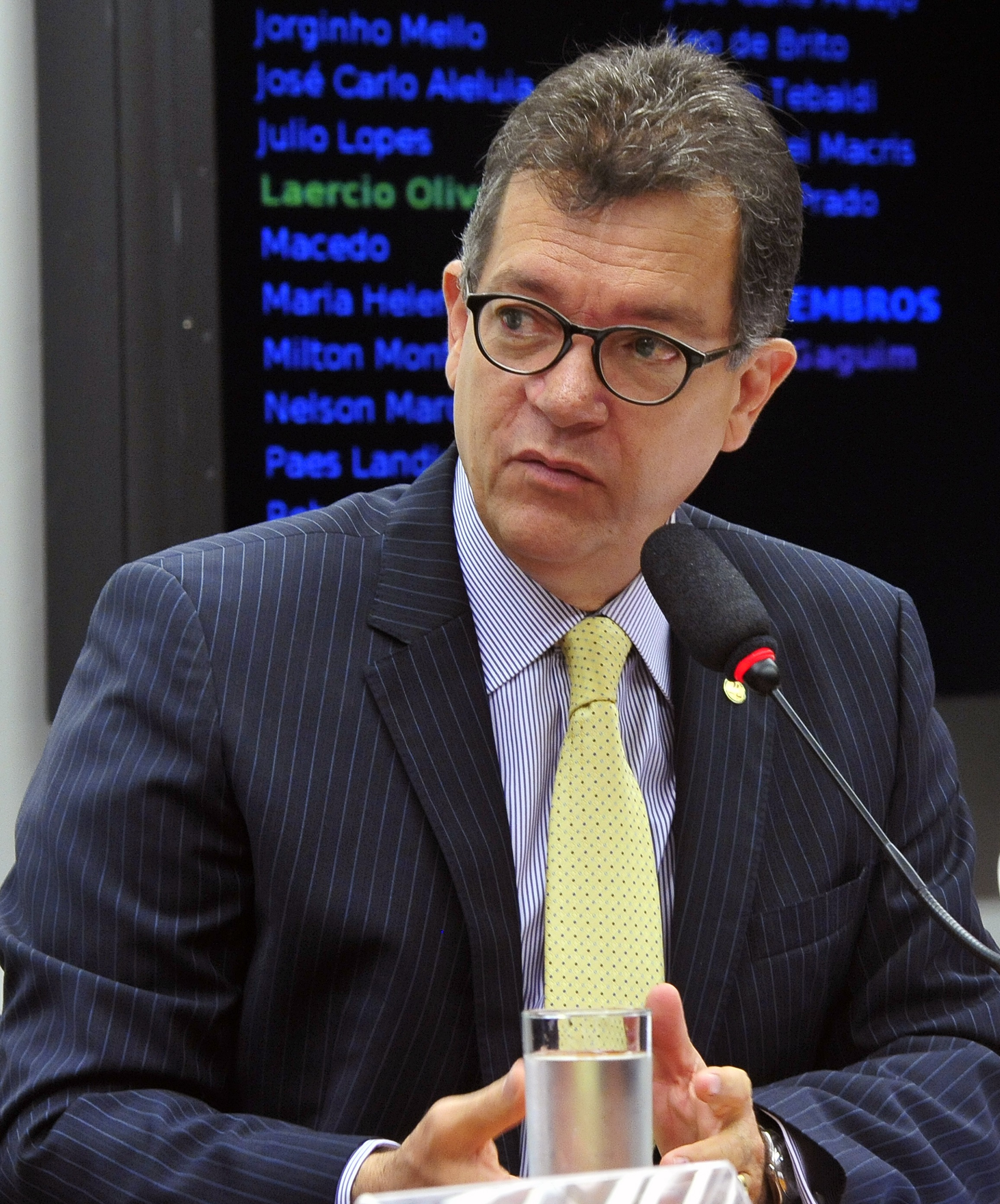 Laércio Oliveira em maio de 2015.